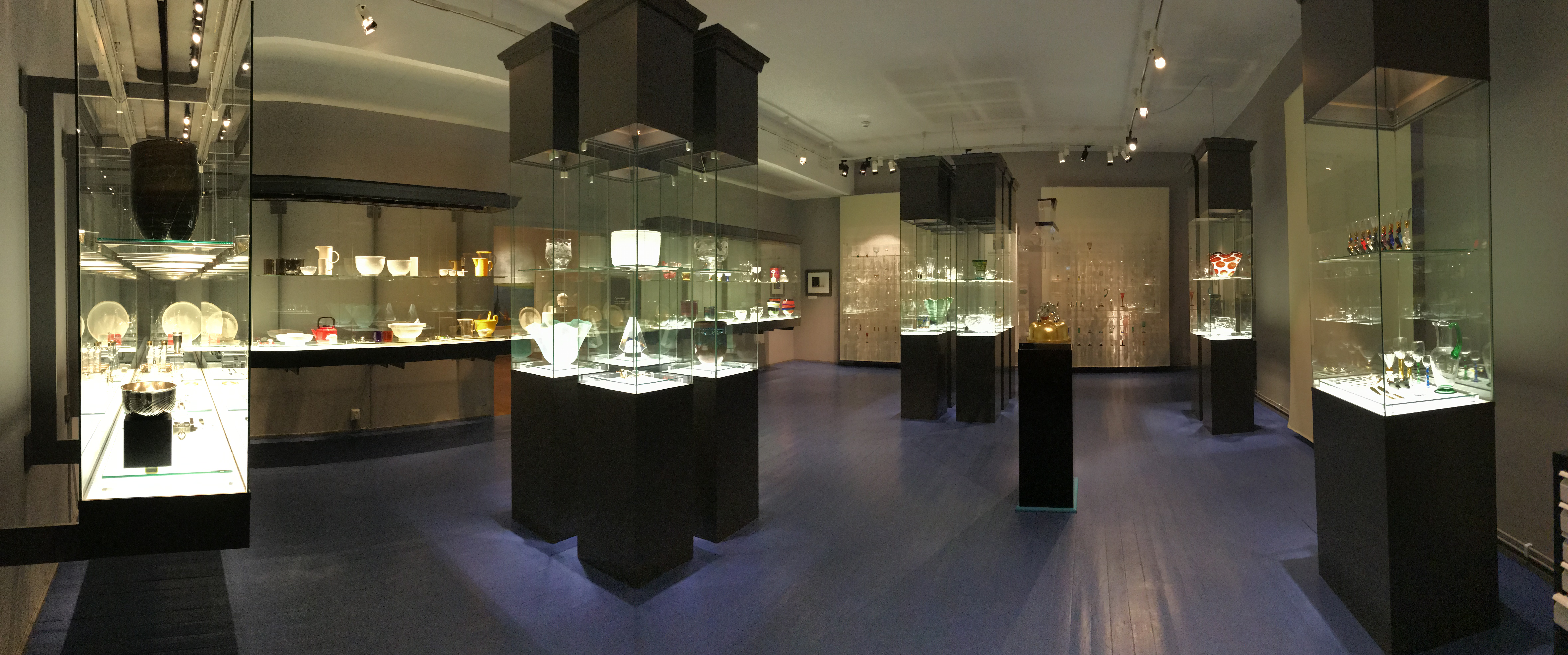 Cyrénsalen på Länsmuseet Gävleborg, skapad av Gunnar Cyrén själv, som formgett hela interiören, montrarna, belysningen och själva utställningen.